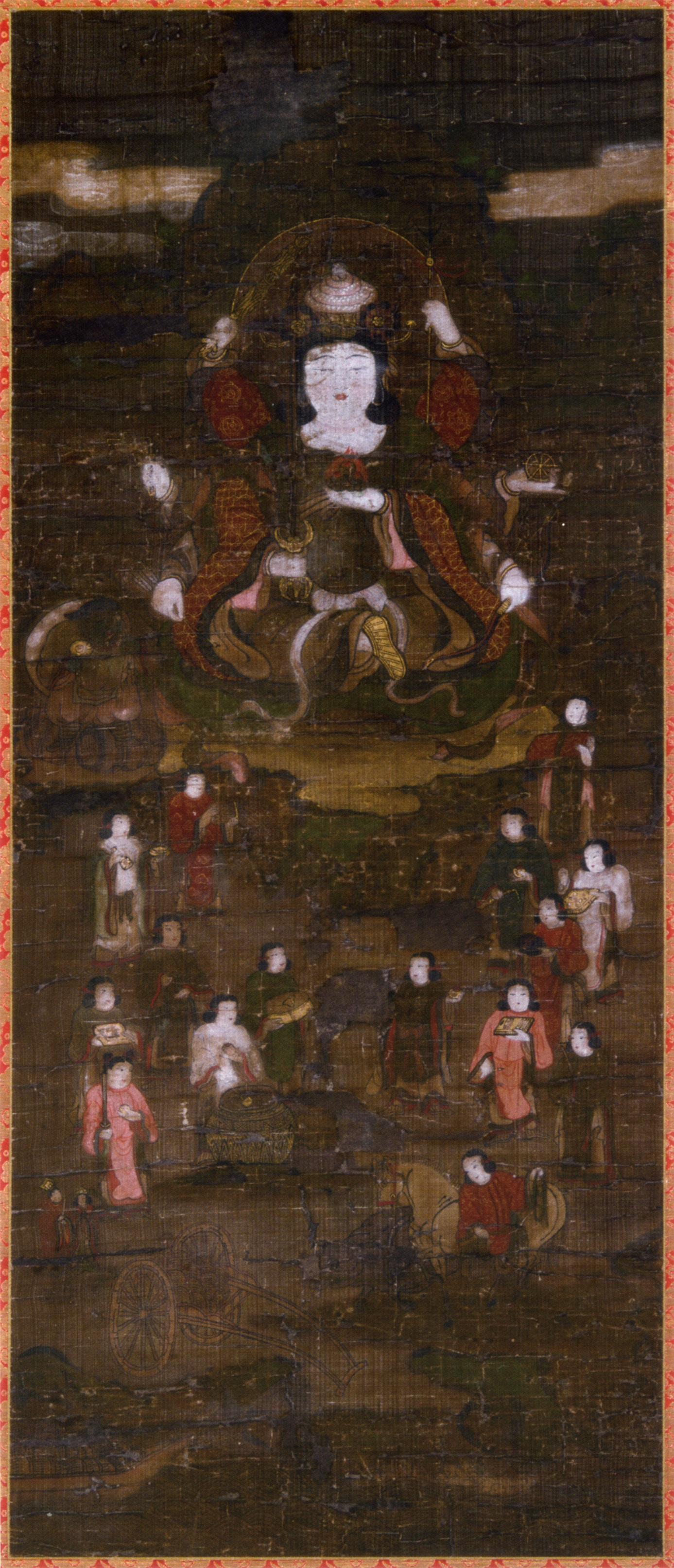 『弁財天十五童子像 一幅』 高月院（愛知県豊田市）所蔵 掛幅装 絹本着色 縦94.5センチメートル、横39.9センチメートル 豊田市指定文化財（昭和47年2月24日）